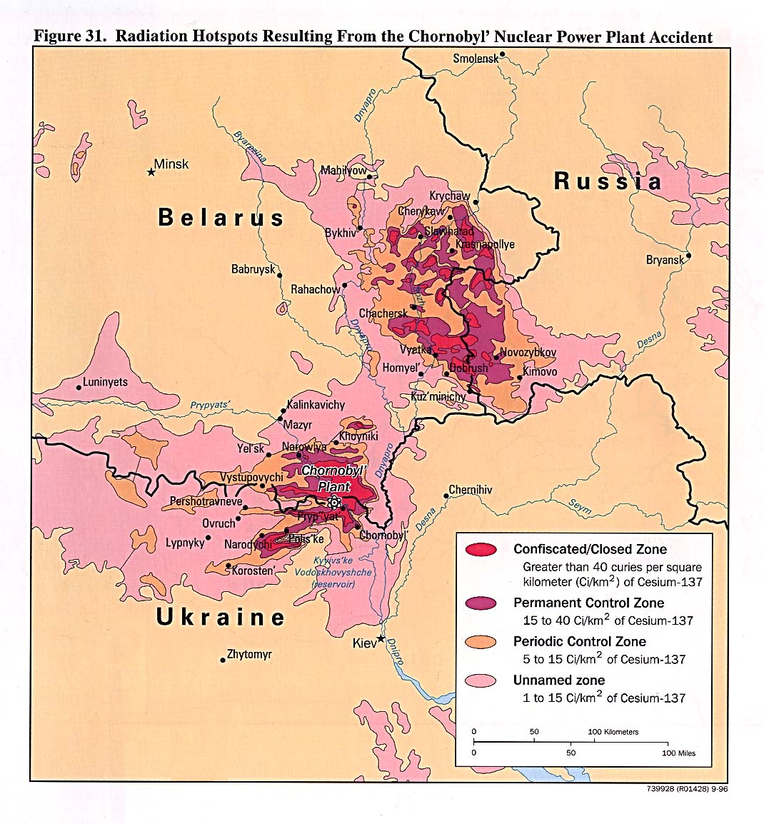 切尔诺贝利核电站事故后周边地区受到核辐射的剂量示意图。